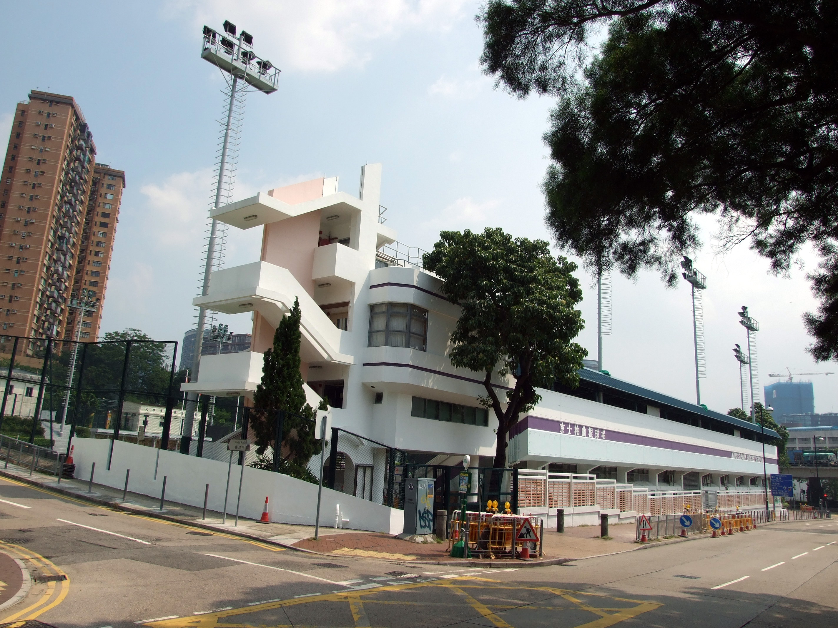 中文（香港）: 京士柏曲棍球場